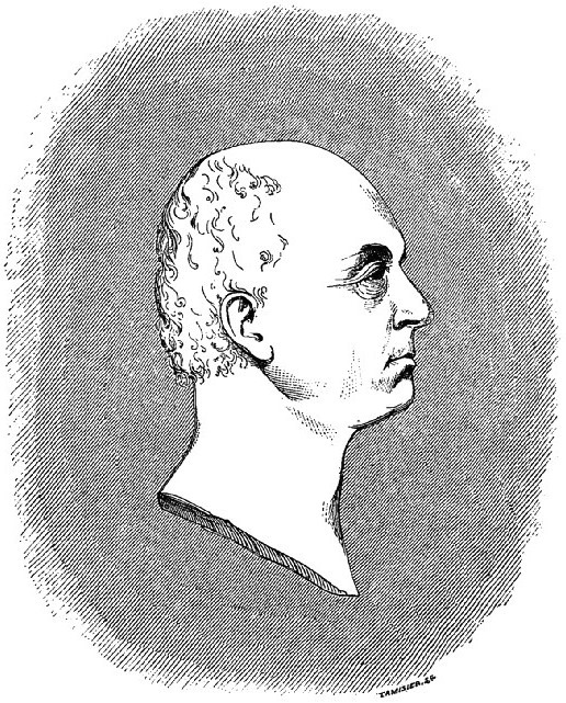 "Jean Reynaud (1806-1863). (Dessin de Mme J. Reynaud, 1863)".